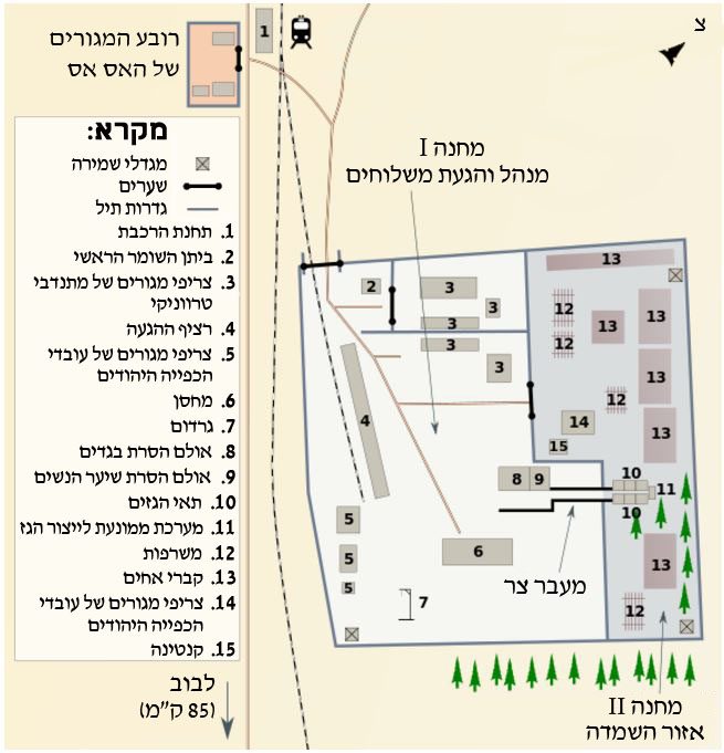 מפת בלזץ' בעברית